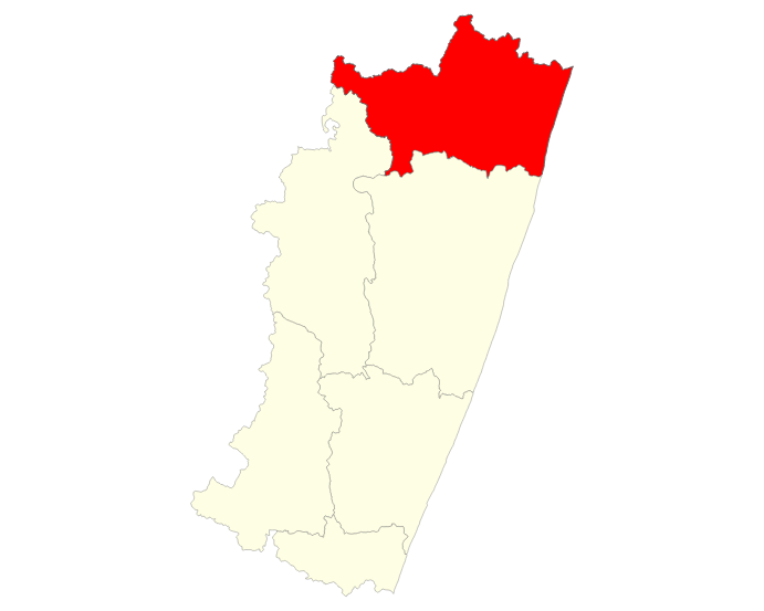 Localisation du district de Nosy Varika dans la région Vatovavy-Fitovinany